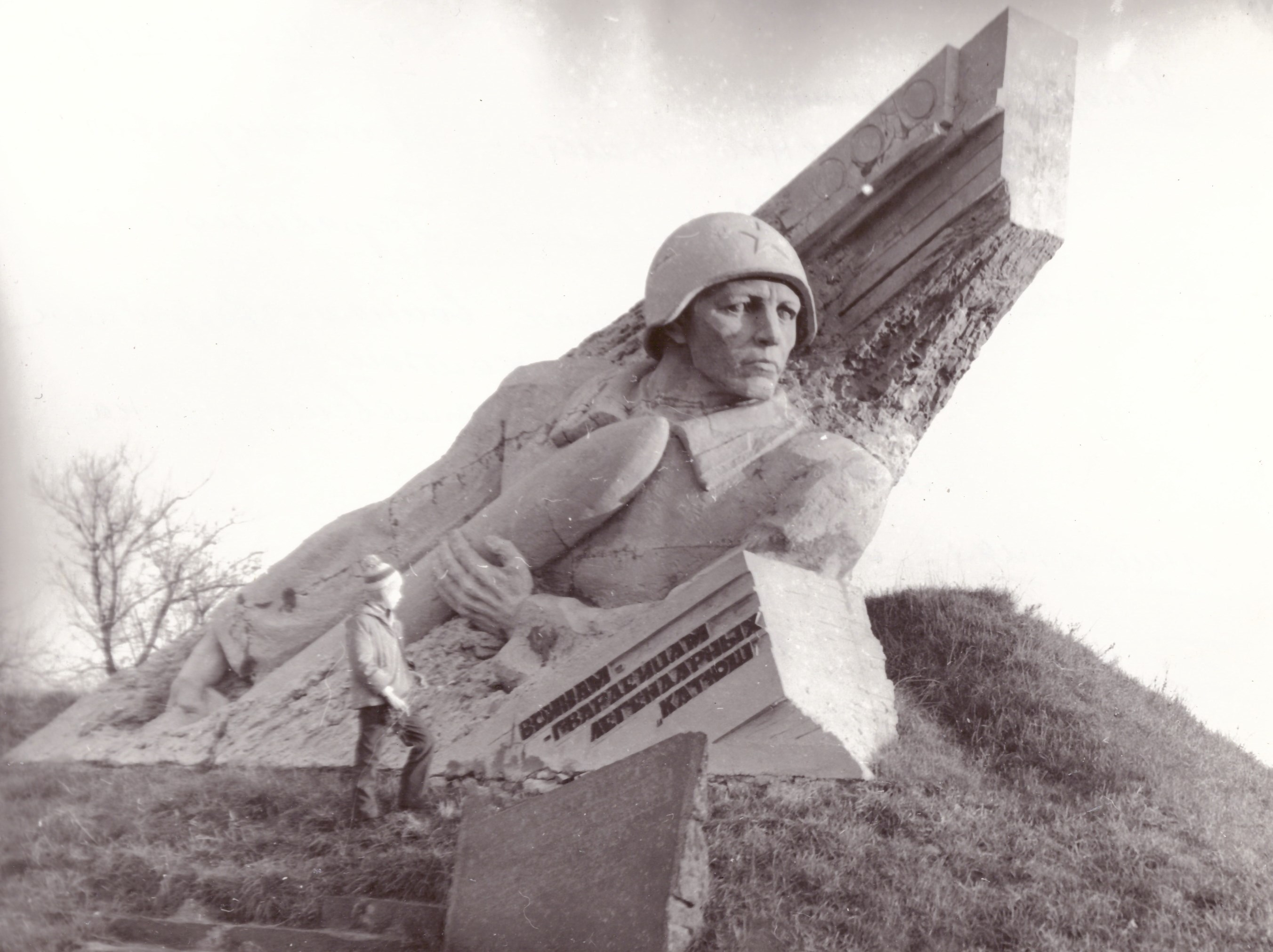 Пам’ятник воїнам-гвардійцям легендарних «Катюш». С. Ставище Коростишівський район Житомирська область. 1979. Скульптор Таранченко В.О., архітектор Марчук М.Г. Горельєф. Литий бетон. 570 х 715 х 260.